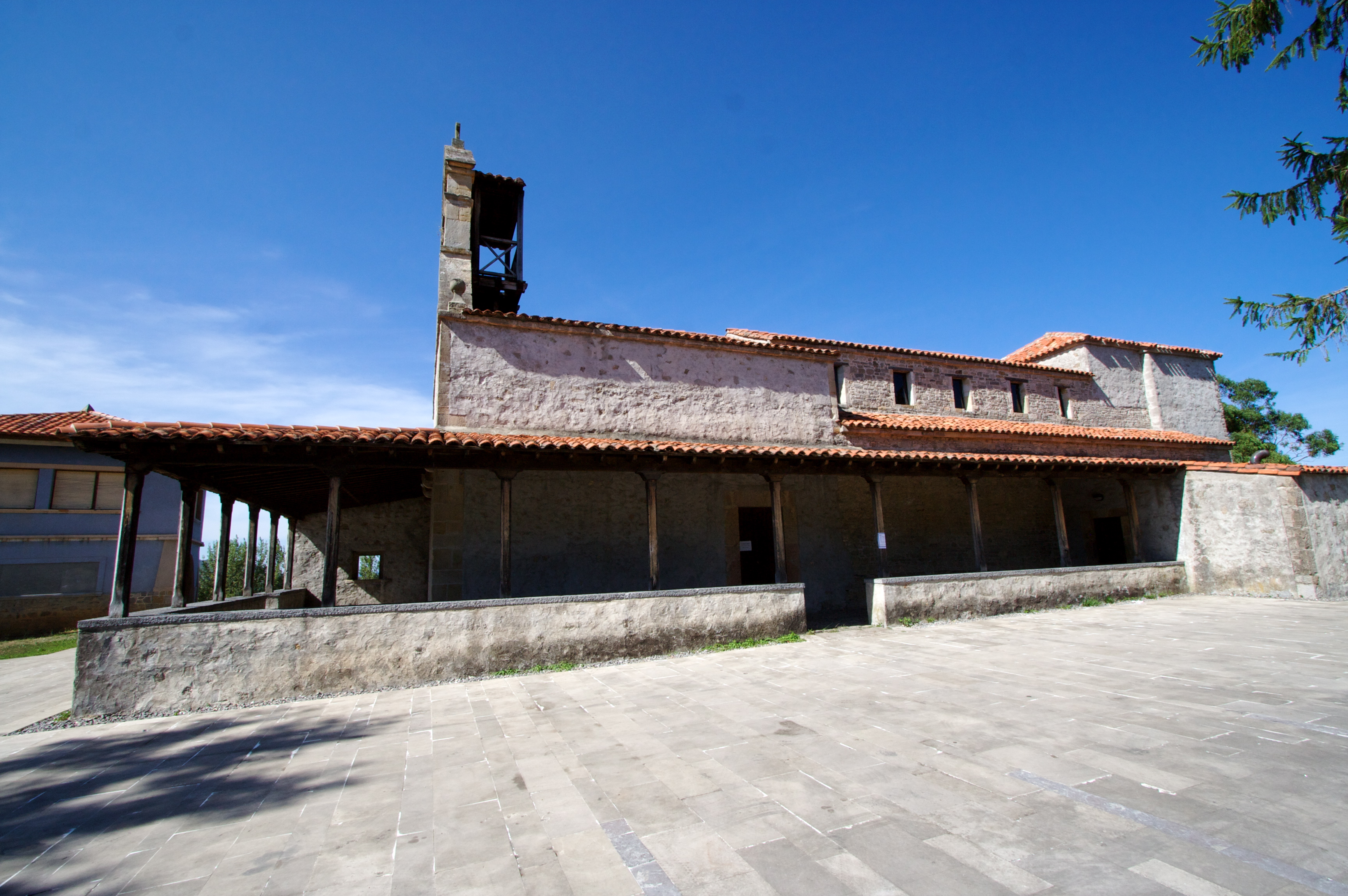 Iglesia prerrománica de Santiago de Gobiendes.